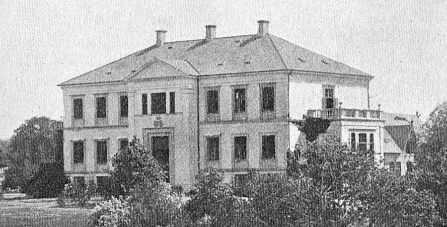 Egeløkke har, som de andre små adelsgårde på Langeland, en historie, der går tilbage til slutningen af middelalderen. Gården nævnes første gang i 1426 og ligger i Bøstrup Sogn, Langelands Nørre Herred, Tranekær Kommune. Hovedbygningen er opført i 1845-1846 og tilbygget i 1890.